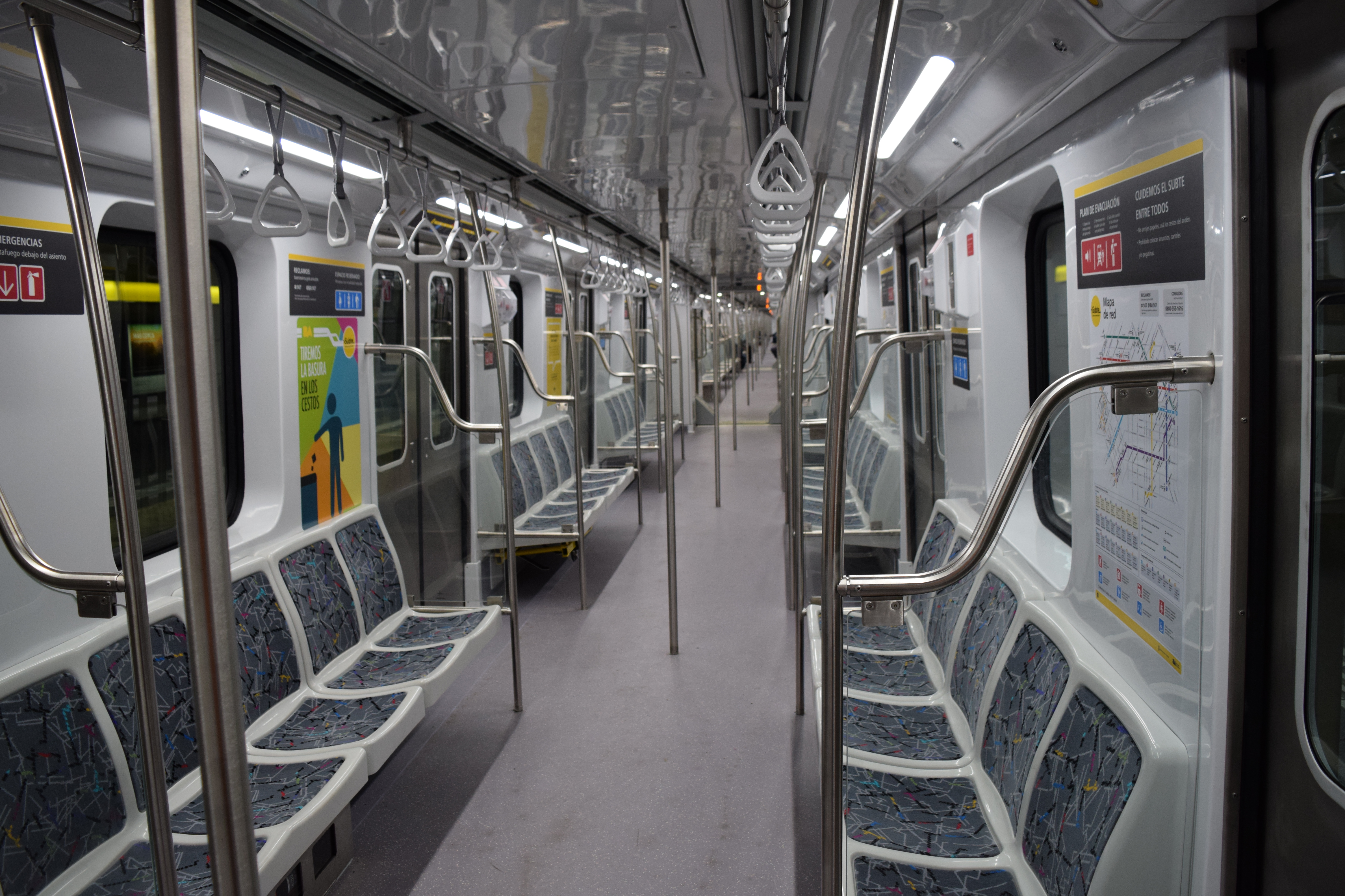 Alstom serie 300 en su primer día de funcionamiento en la línea H del Subte de Buenos Aires.